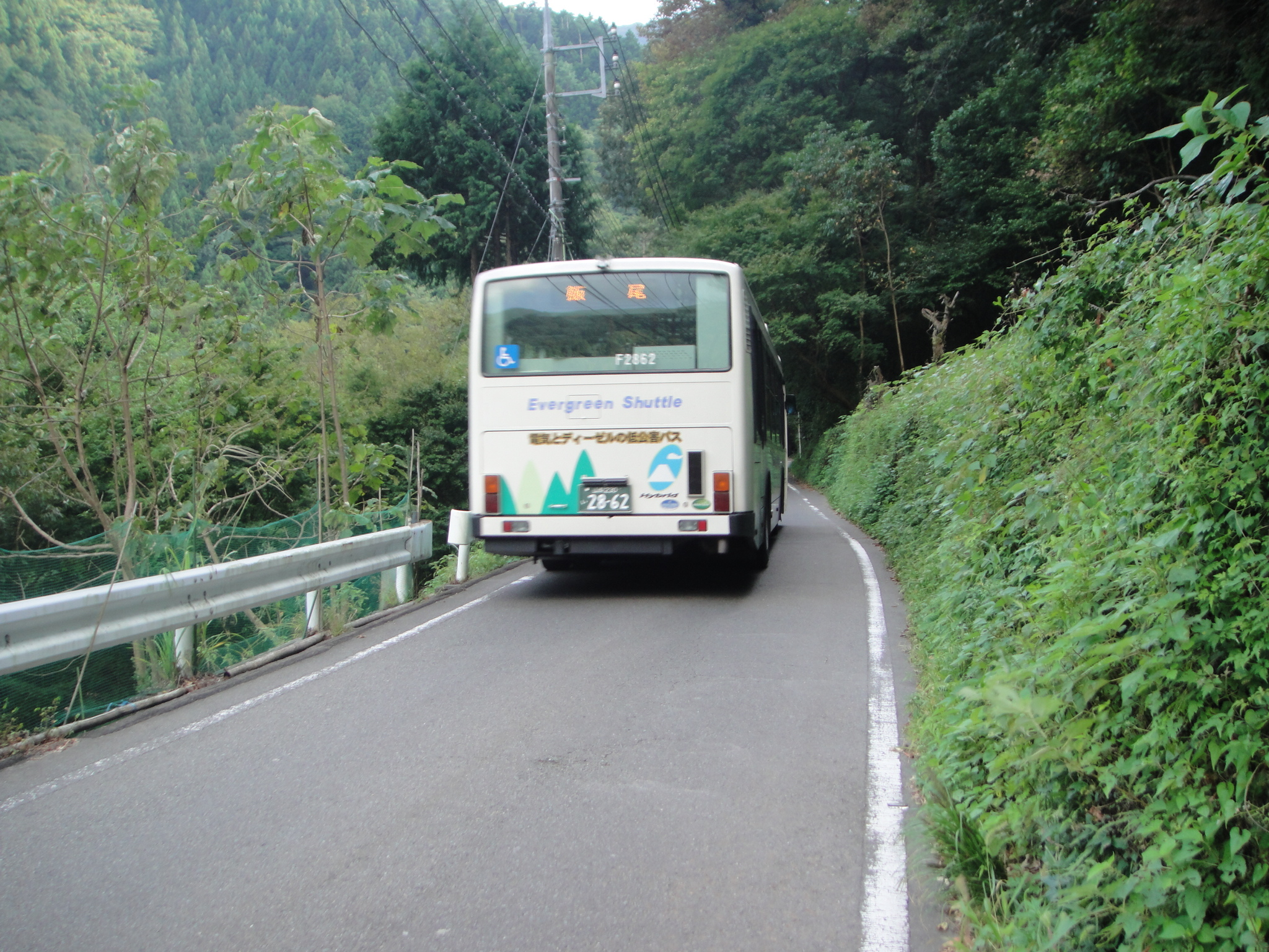 山梨県道18号を走行するバス